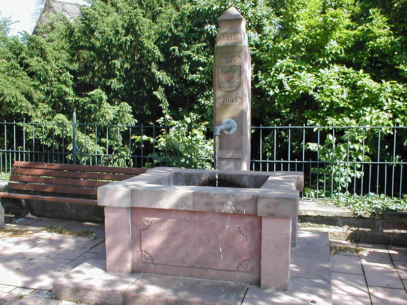 Ortsbrunnen in Epfenbach, erbaut 1811, renoviert 1926 und 2003